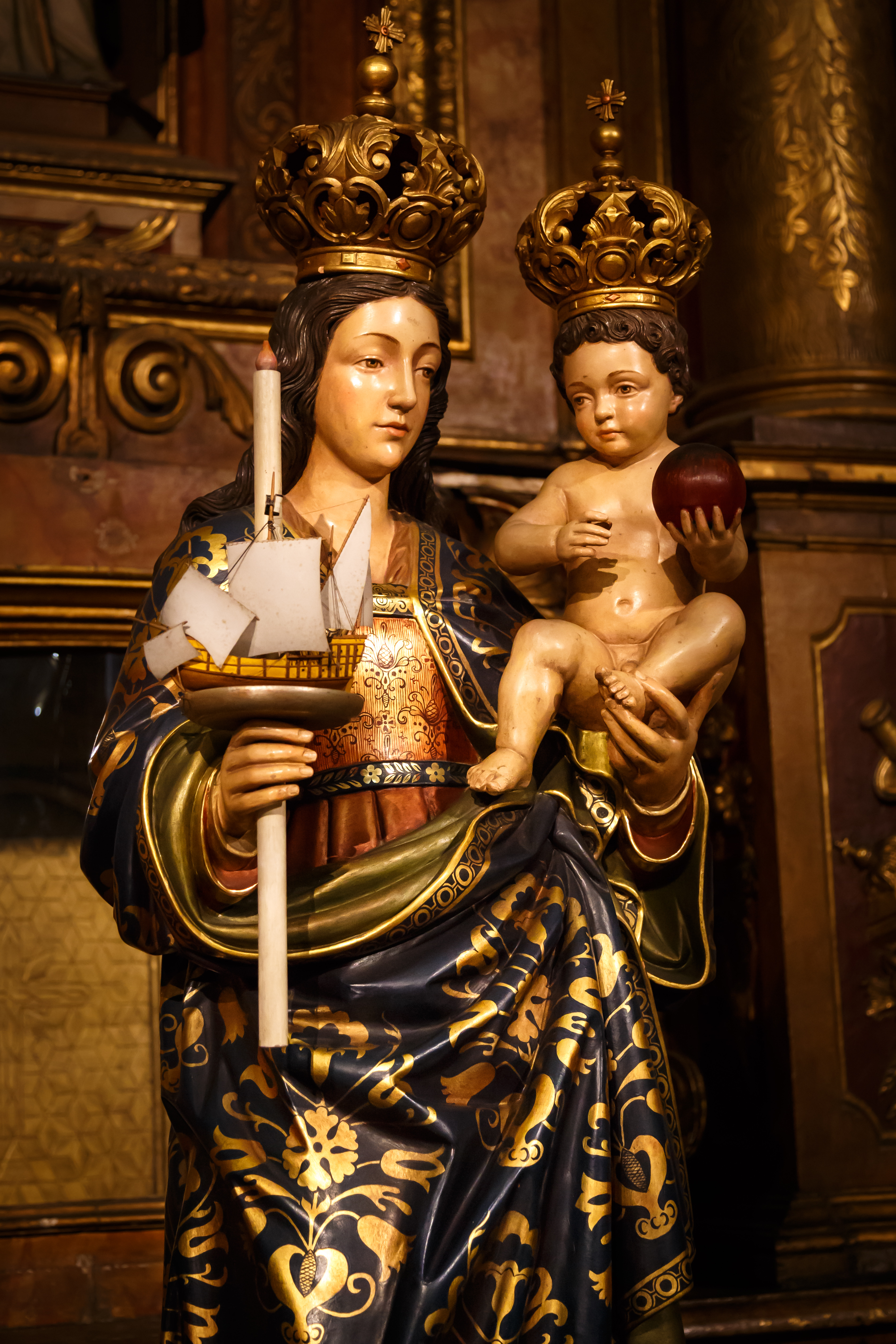 Interior de la Catedral Metropolitana de Buenos Aires. Retablo privilegiado de San Martín de Tours. Imagen de Nuestra Señora de Buenos Aires.